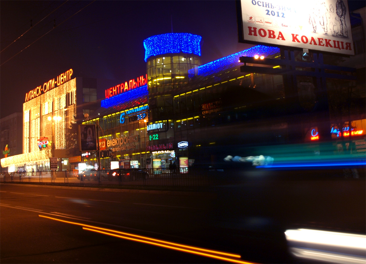 Торгівельні центри на вул. Радянській (Луганськ)